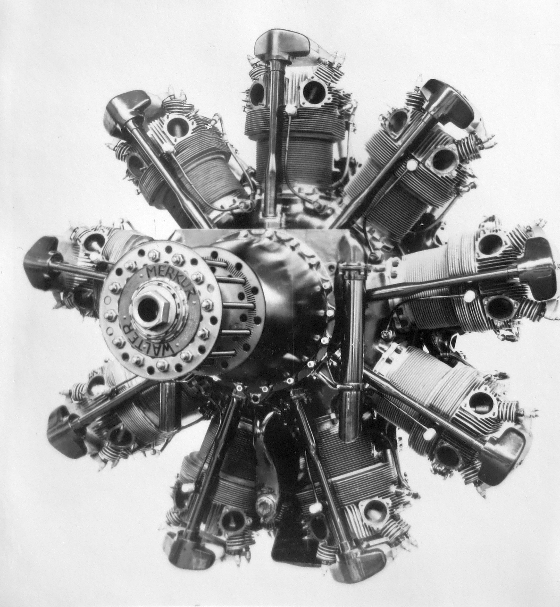 letecký motor Walter Merkur V-S2, licence Gnome-Rhône